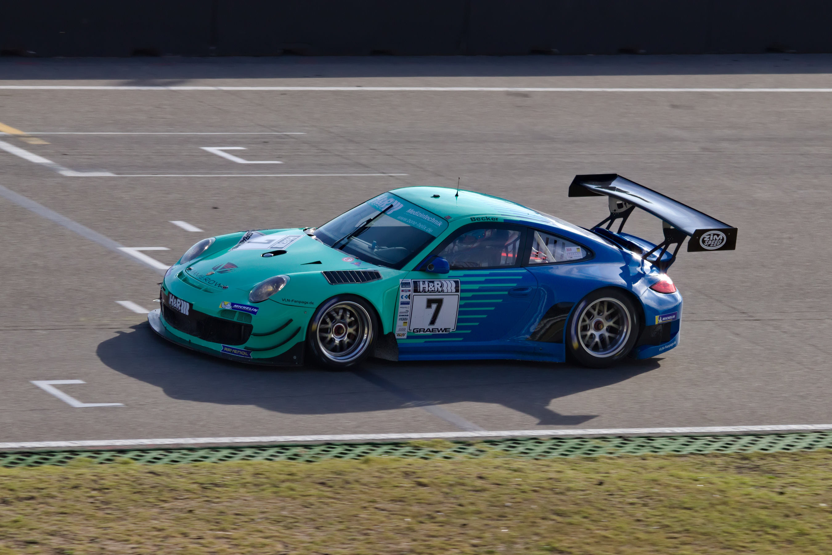 Ulrich Becker beim Qualifikation für das zweite Rennen der STT 2019 auf dem Hockenheimring